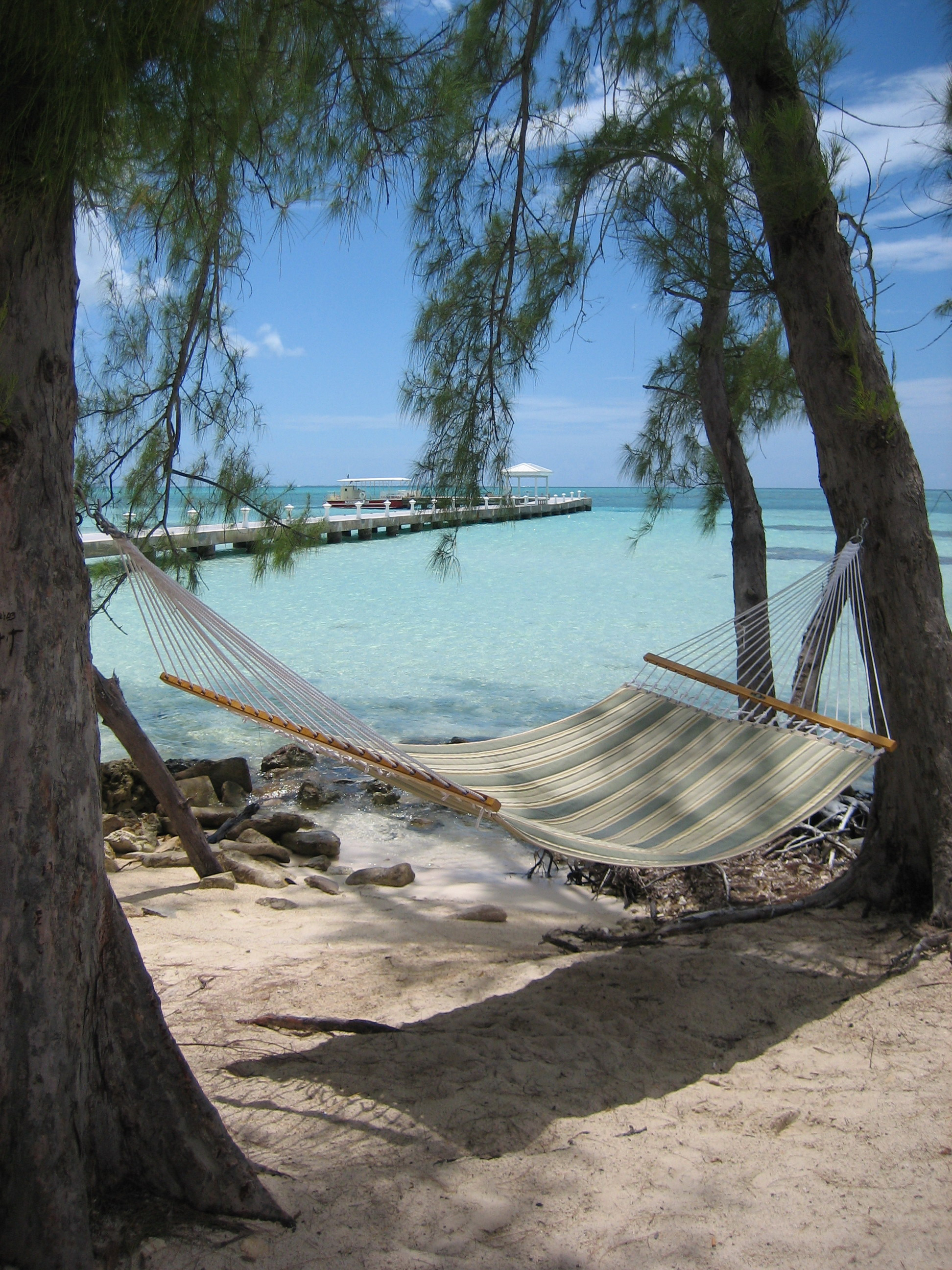 Rum Point auf den Cayman Islands (British West Indies)